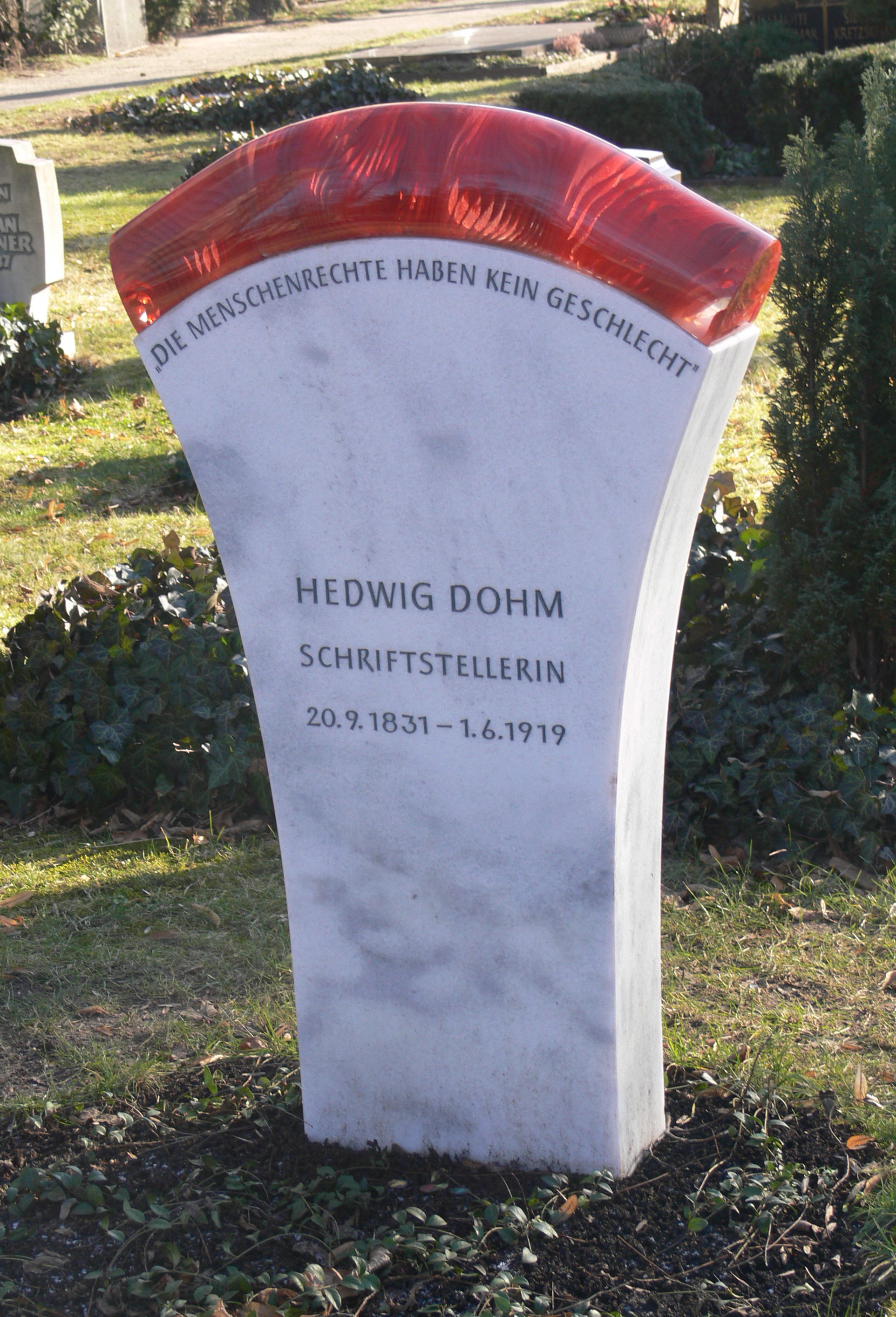 Alter St.-Matthäus-Kirchhof Berlin-Schöneberg Grabstätte Hedwig Dohm